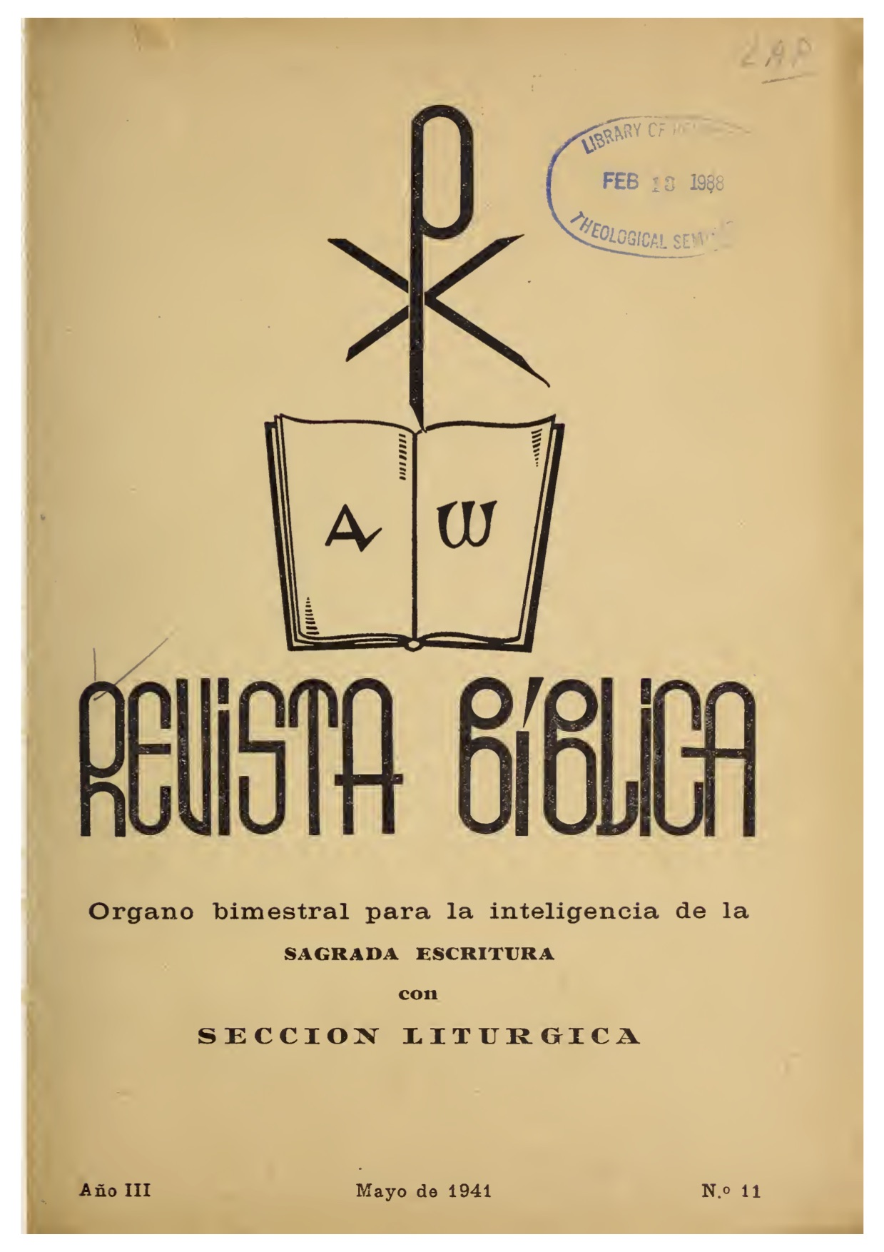 Tapa año III